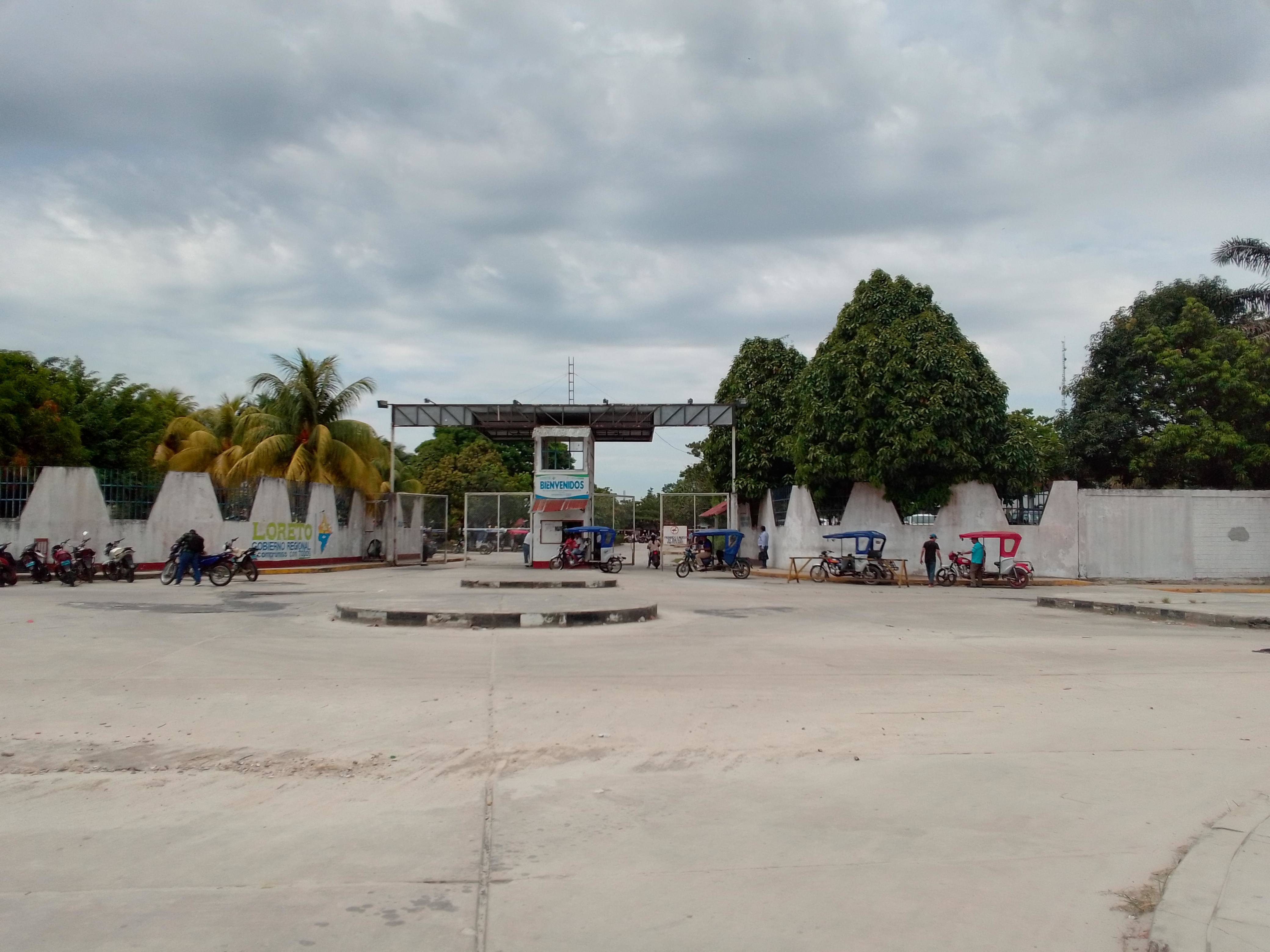 Local del Gobierno Regional de Loreto